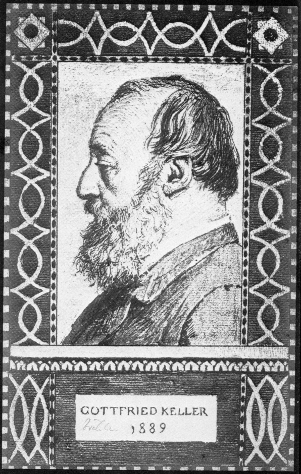 Gottfried Keller aged 70